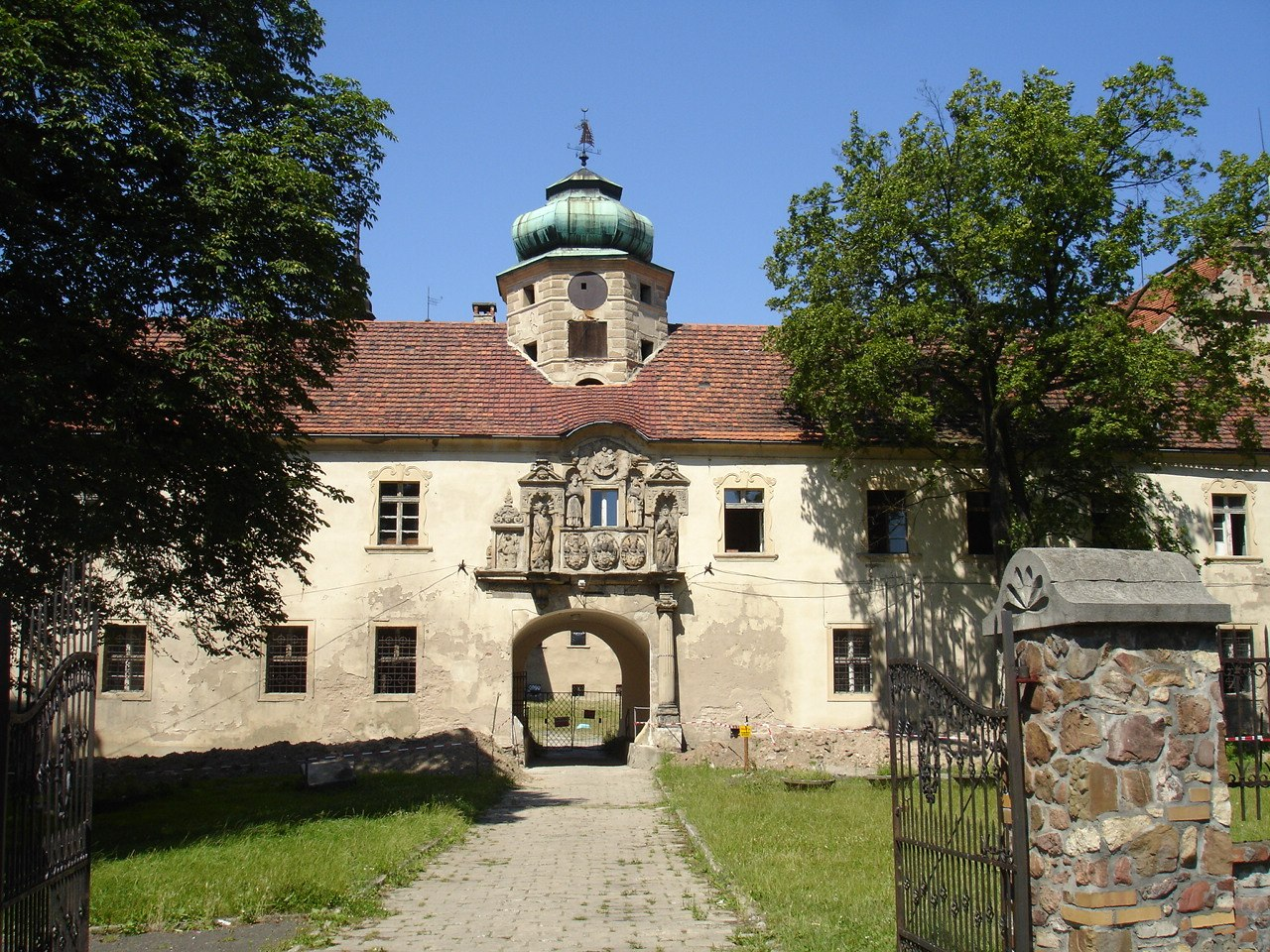 Castle in Głogówek (Oberglogau)